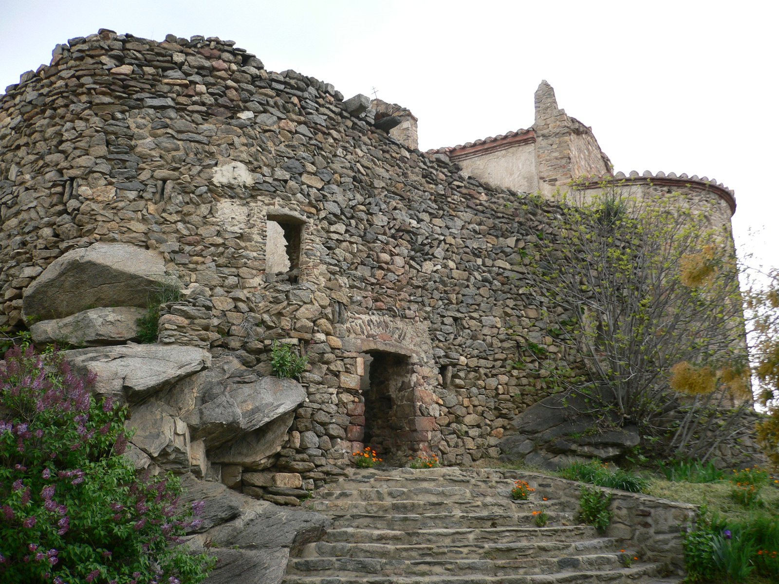 Située à proximité du Prieuré de Marcevol